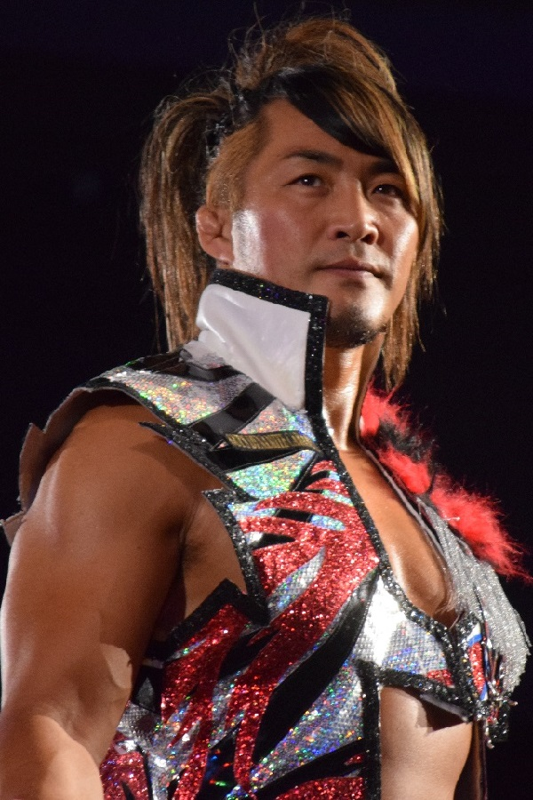 2016年8月6日 大阪府立体育会館 「G1 CLIMAX 26」 棚橋弘至